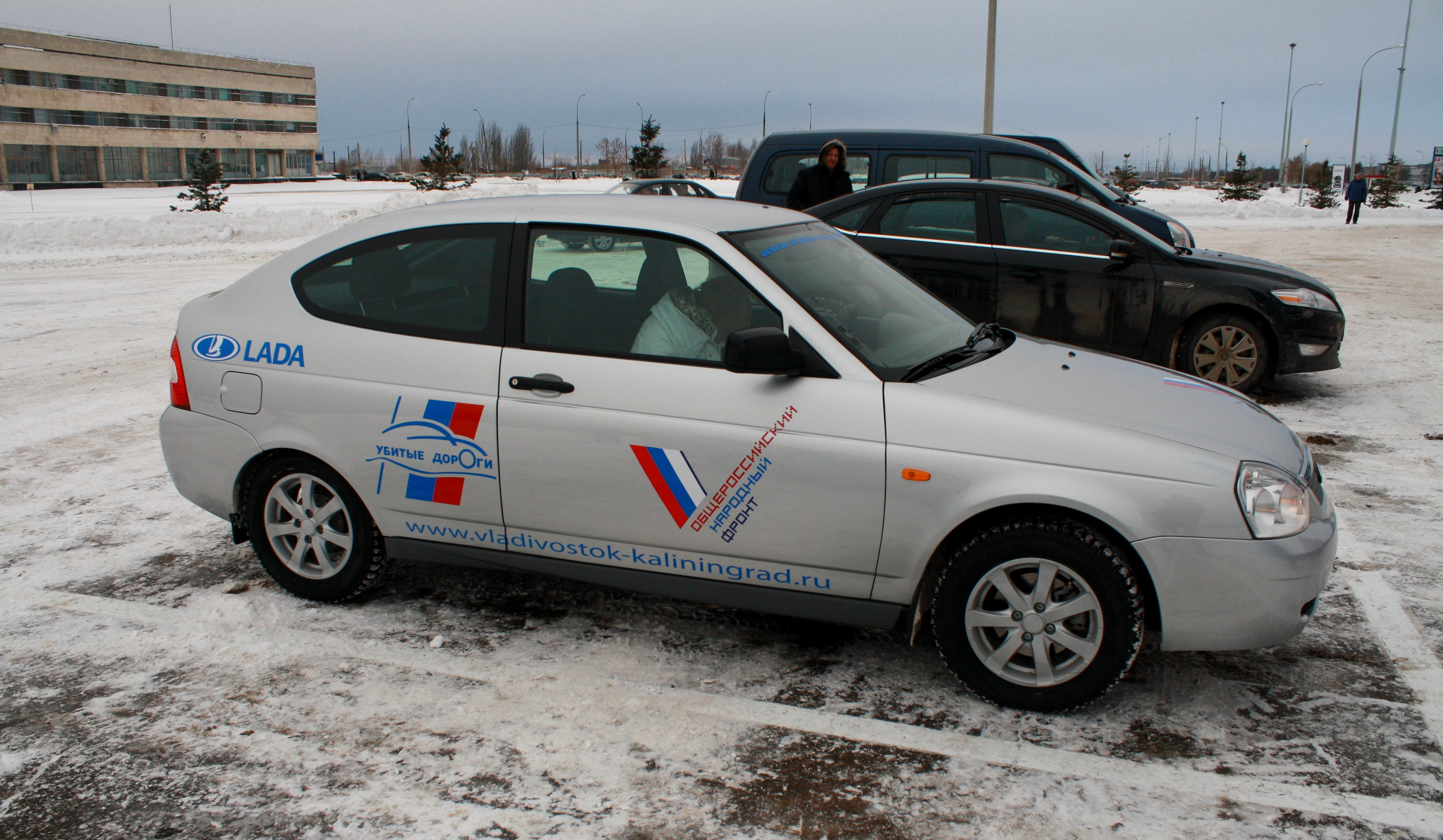 Автомобиль-участник пробега Владивосток-Калининград. Организованный Общероссийском народным фронтом. vladivostok-kaliningrad.ru/ сайт проекта.